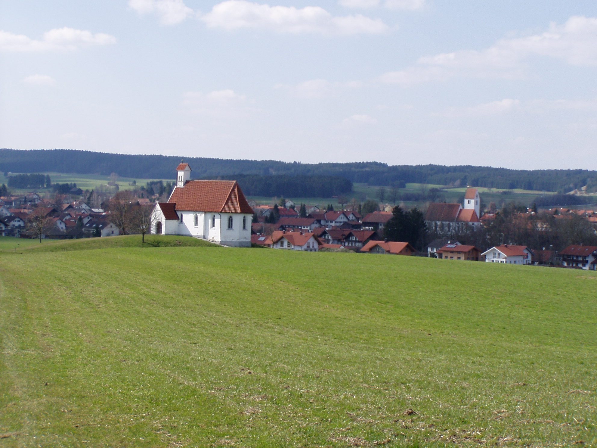 St Ursula bei Hohenfurch, Lkr Weilheim-Schongau